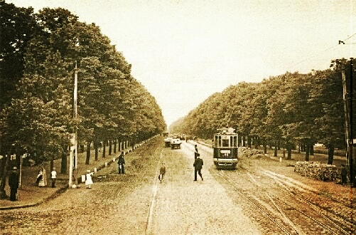 Wielka Aleja (Aleja Zwycięstwa) w Gdańsku.